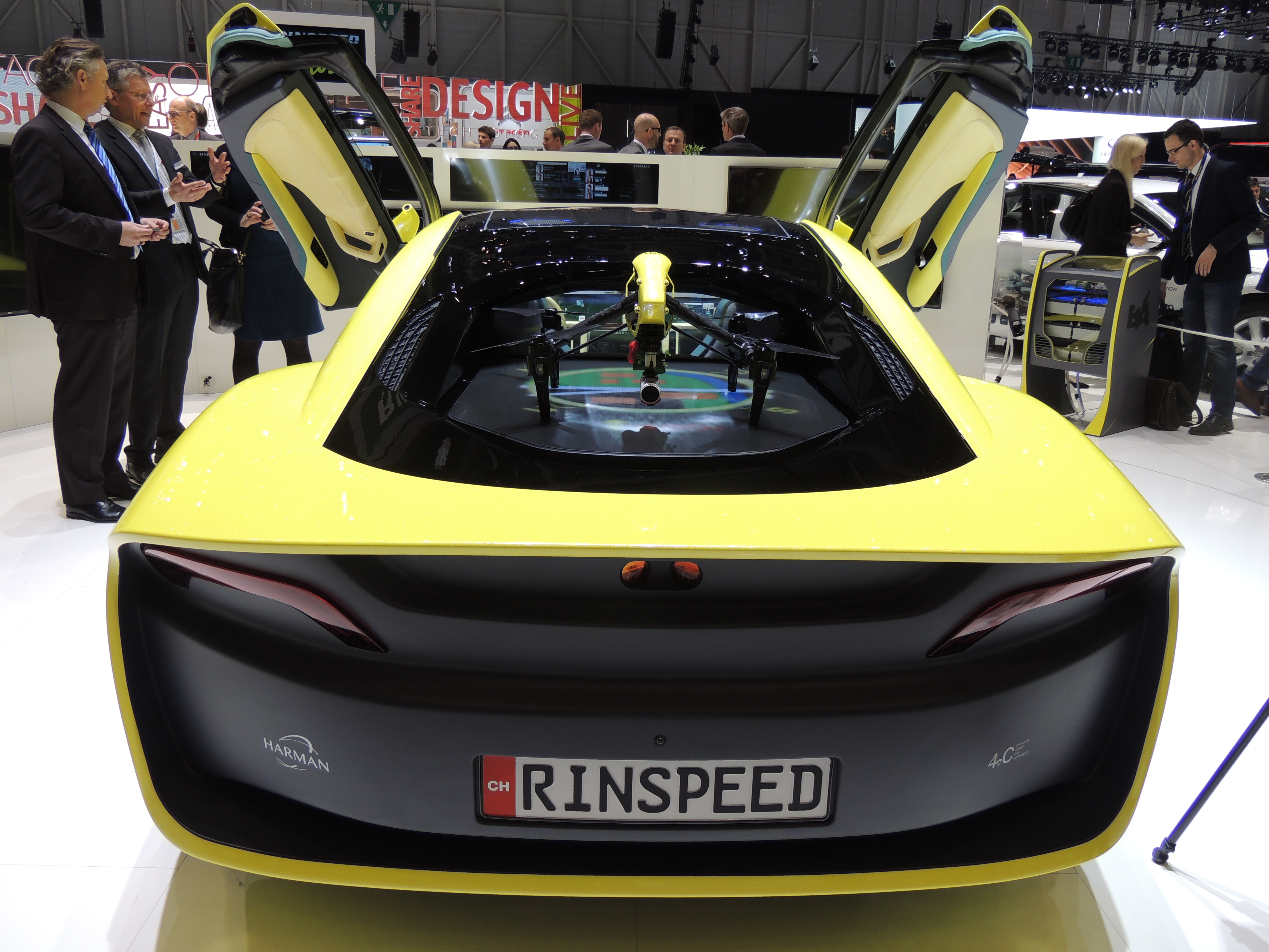 Rinspeed Ʃtos drone, salon de Genève 2016